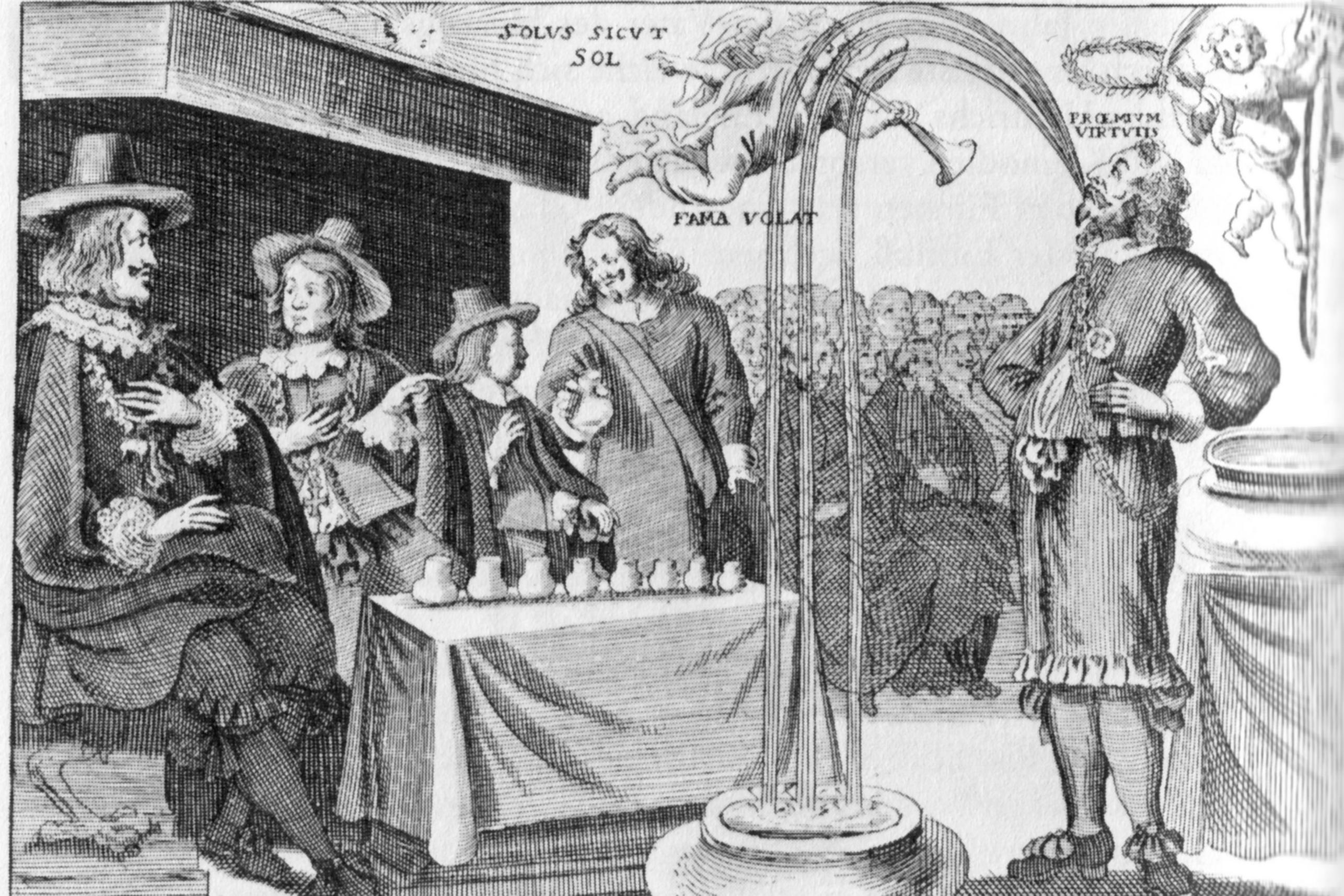 Schauspieler und Illusionist Manfredi aus Malta bei einer Vorführung; ein "Wasserkünstler", Darstellung des 17. Jhs.